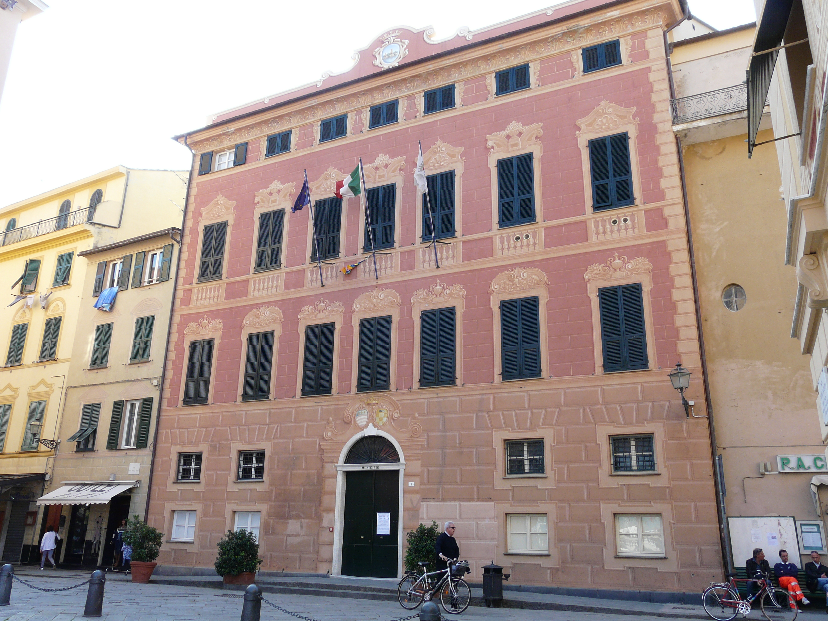 Palazzo Durazzo-Pallavicini, sede del municipio di Sestri Levante, Liguria, Italia